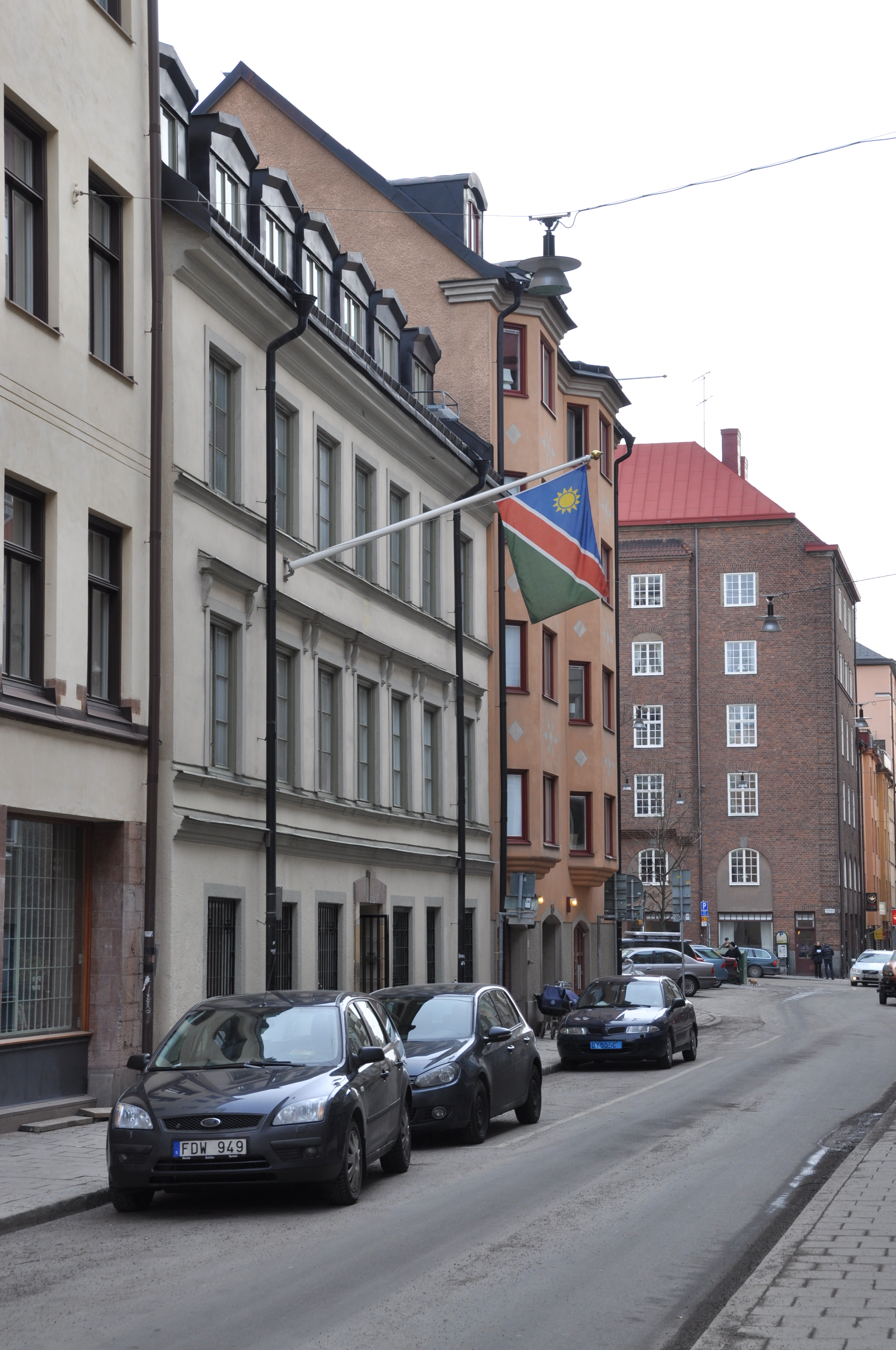 Namibias Ambassad. Luntmakargatan 86. Byggnadsår: 1856, osignerade ritningar byggherre A L Wahlbom.